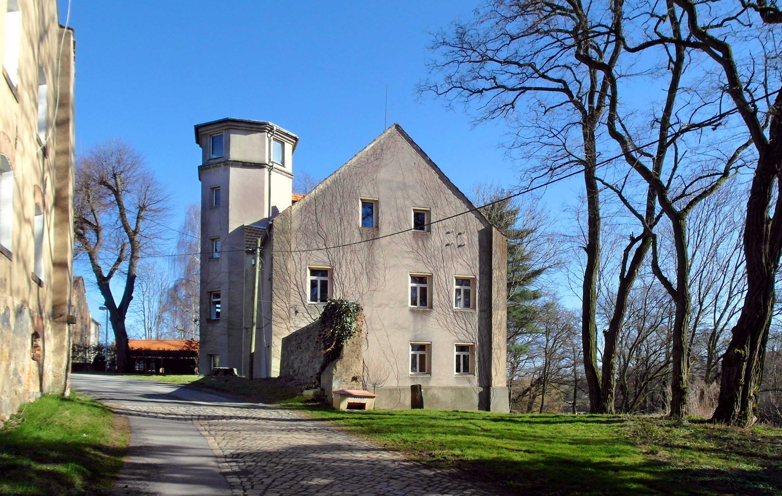 26.03.2017 02748 Kemnitz (Bernstadt), Am Niederhof 2: Rittergut Niederkemnitz. Herrenhaus (vermutl. Mitte des 19. Jh.). Seit 1948 Wohnhaus im Gemeindebesitz. Sicht von Nordwesten. [SAM8764.JPG]20170326410DR.JPG(c)Blobelt